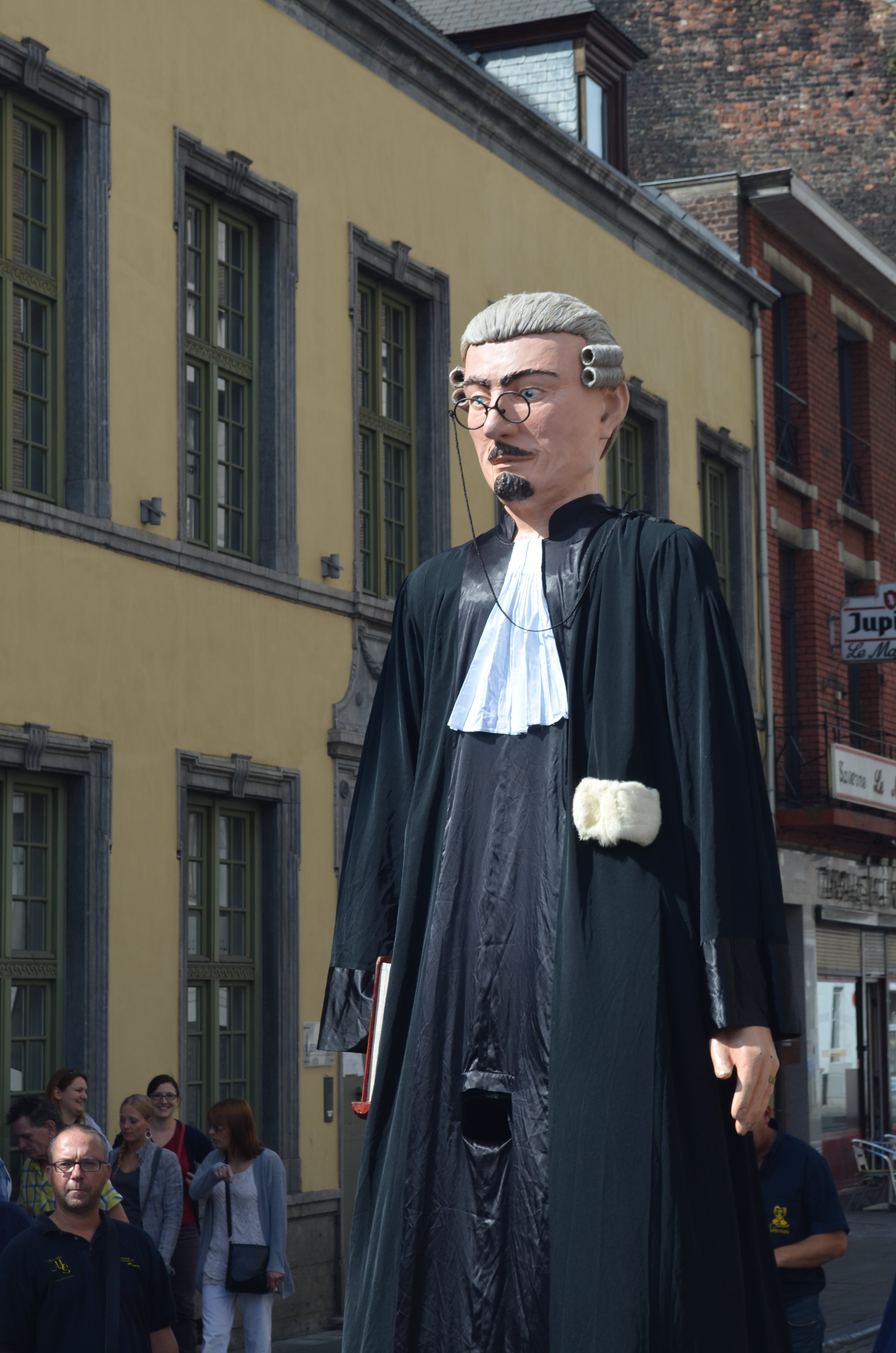 L'Avocat, géant de Papignies (Lessines-Belgique) lors des fêtes organisées pour le 350e anniversaire de la ville de Charleroi.